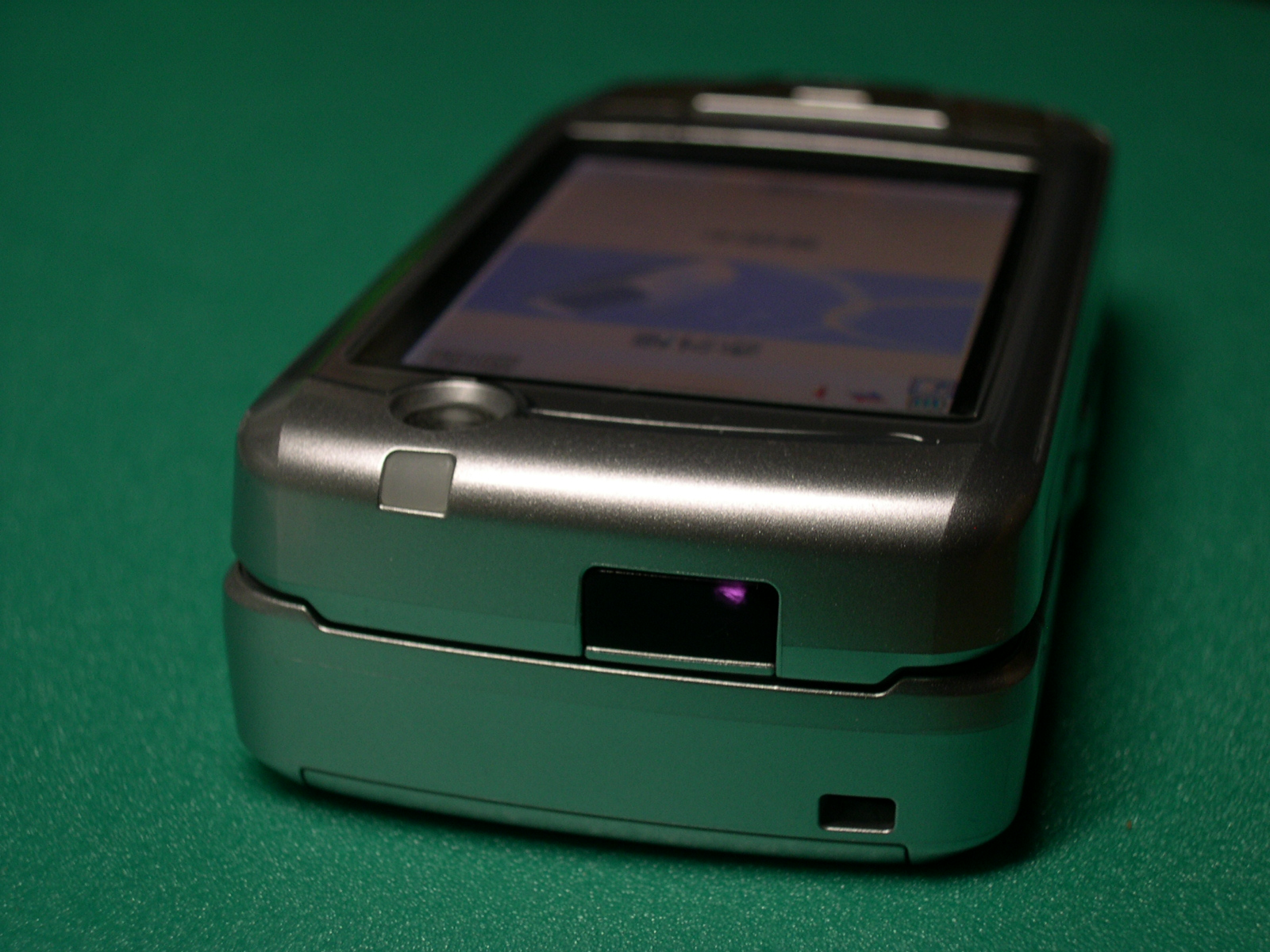 Mobile phone(DoCoMO D901iS) : infrared data communications